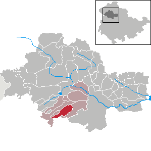 Weberstedt in Thuringia - Unstrut-Hainich-Kreis